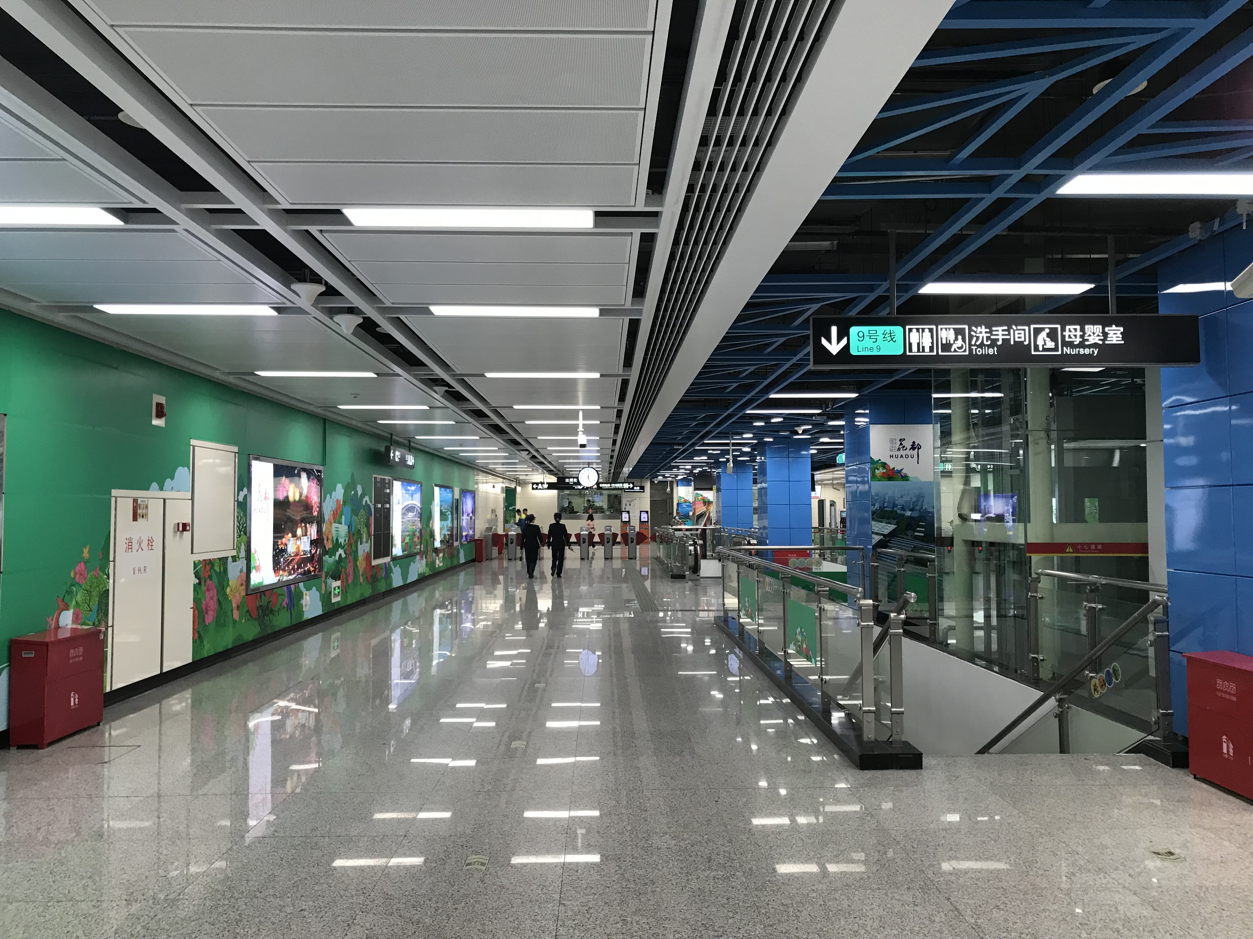 广州地铁花都汽车城站